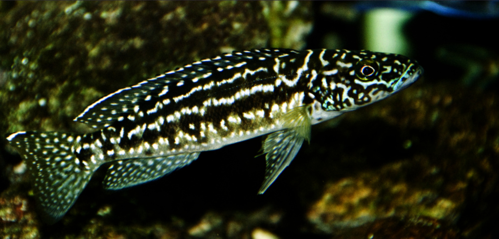 Lepidiolamprologus nkambae Una de los mejores depredadores del lago tanganica